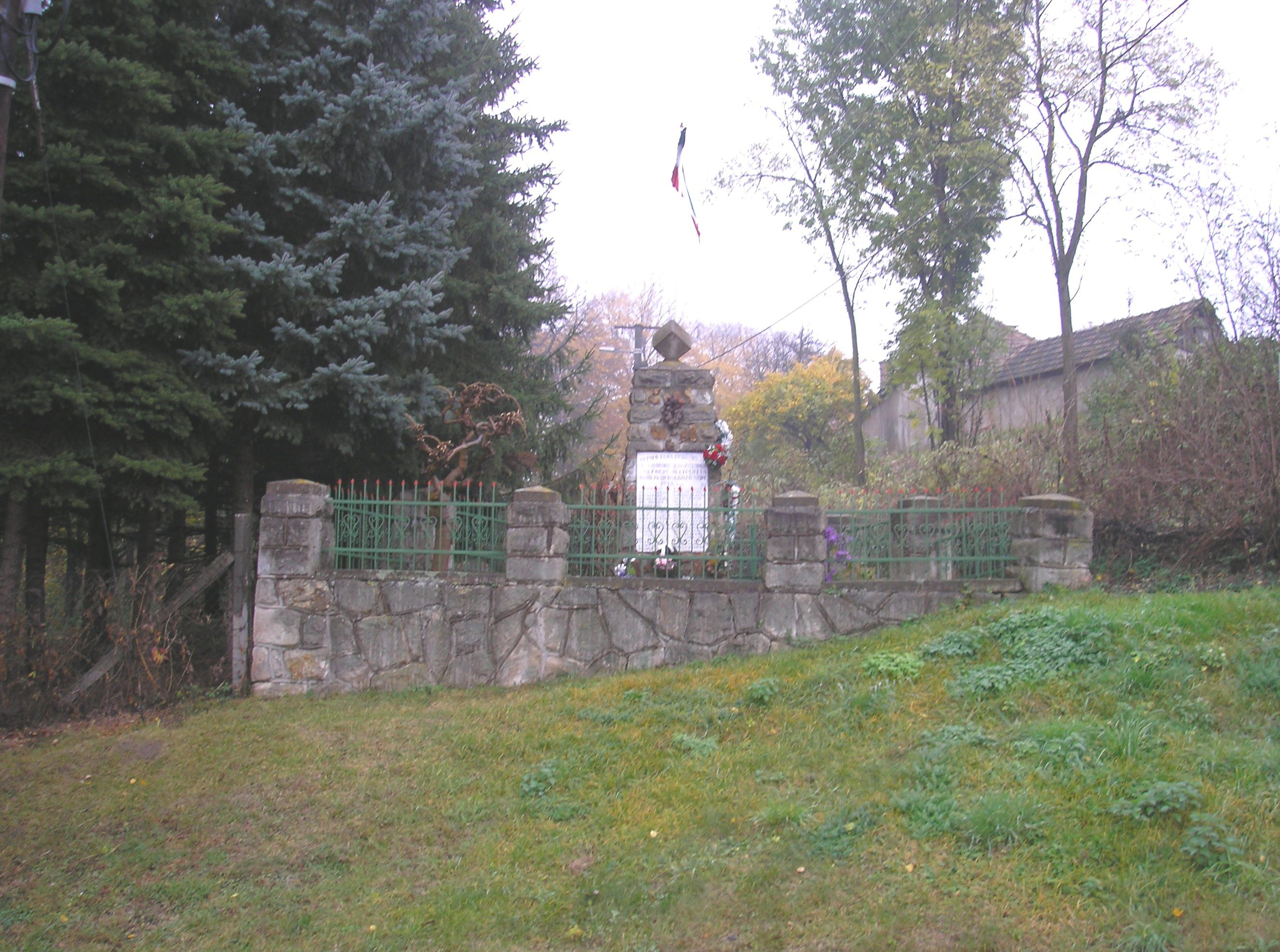 Abaújvár - világháborús emlékmű